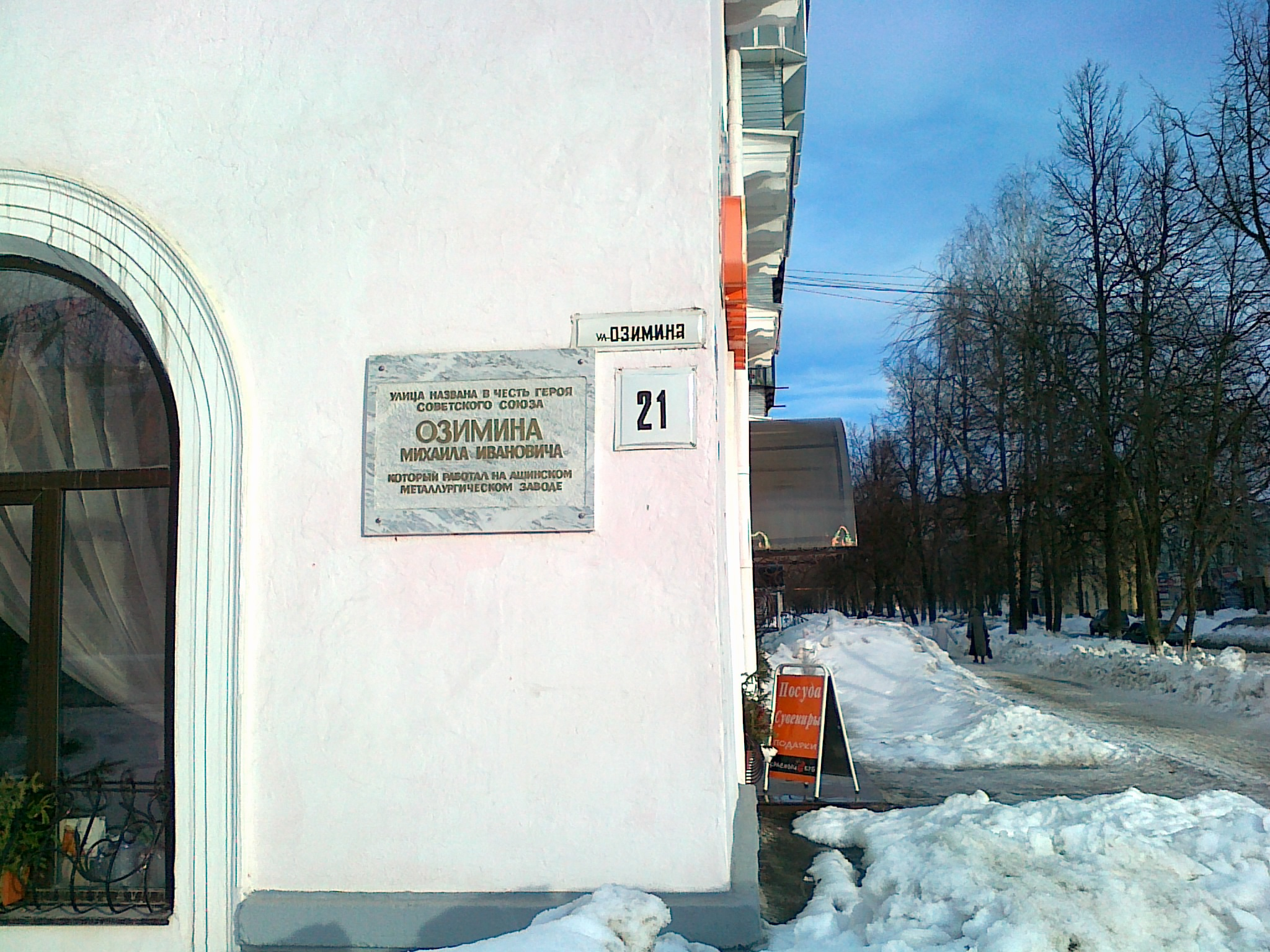 Мемориальная доска в честь Озимина Михаила Ивановича, Героя Советского Союза в г. Аша